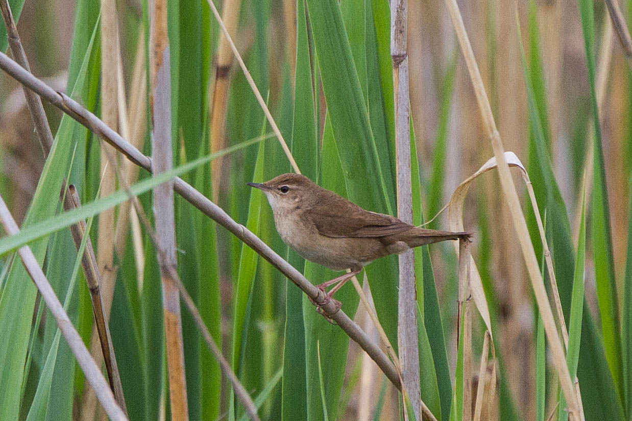 Savi's Warbler (Locustella luscinioides)